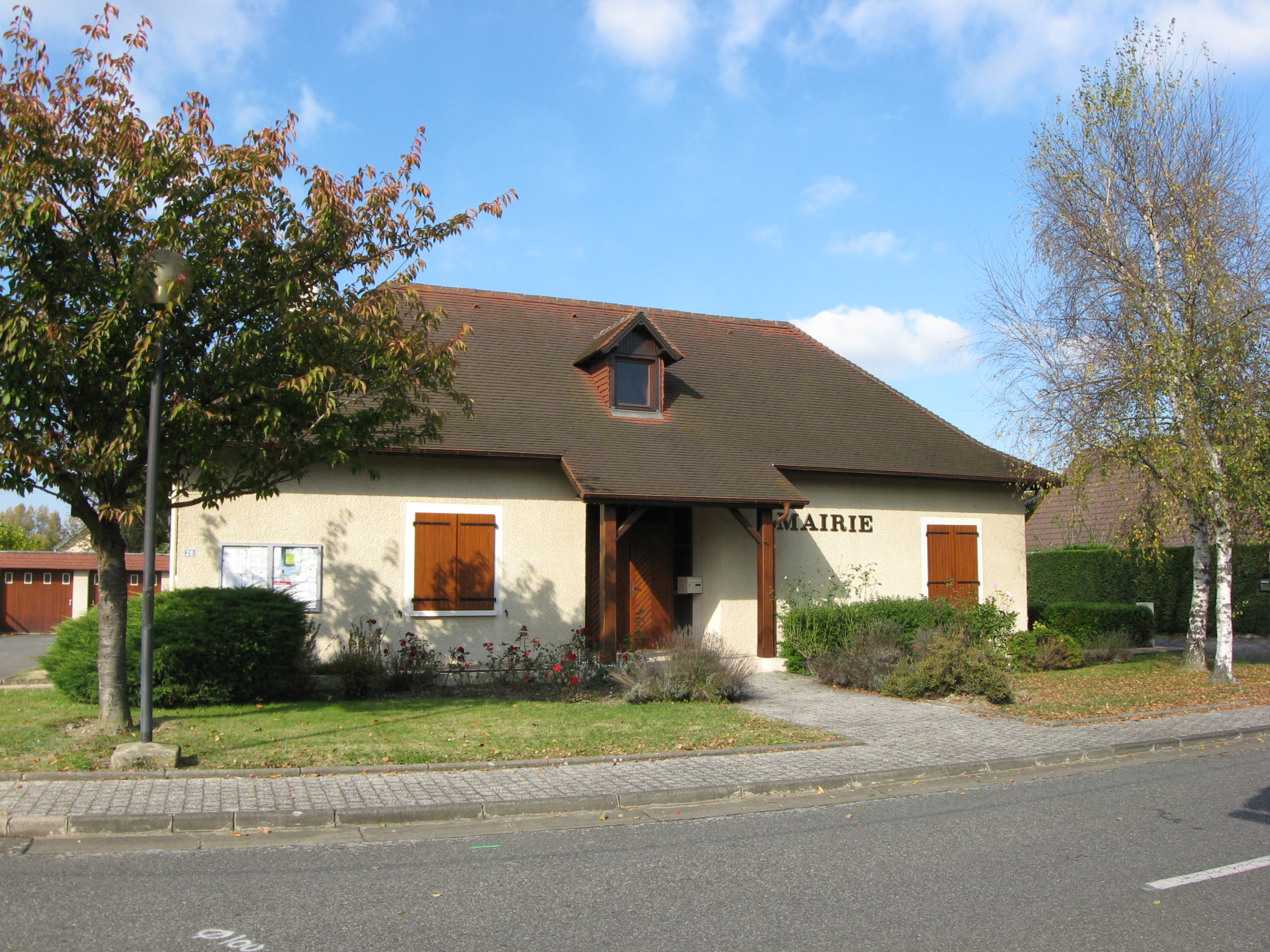 Vue de la mairie d'Abidos (Pyrénées Atlantiques) Pyrénées).